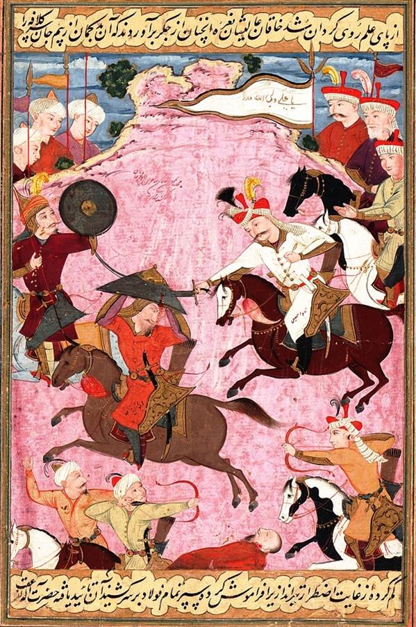 Şah İsmayılın Əbülxeyir xanla döyüşü. Muin Müsəvvir. “Tarix-i aləmaray-i Şah İsmayıl”.